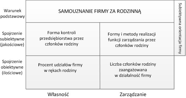 Opracowanie rysunku na podstawie rozważań nad pojęciem firmy rodzinnej.